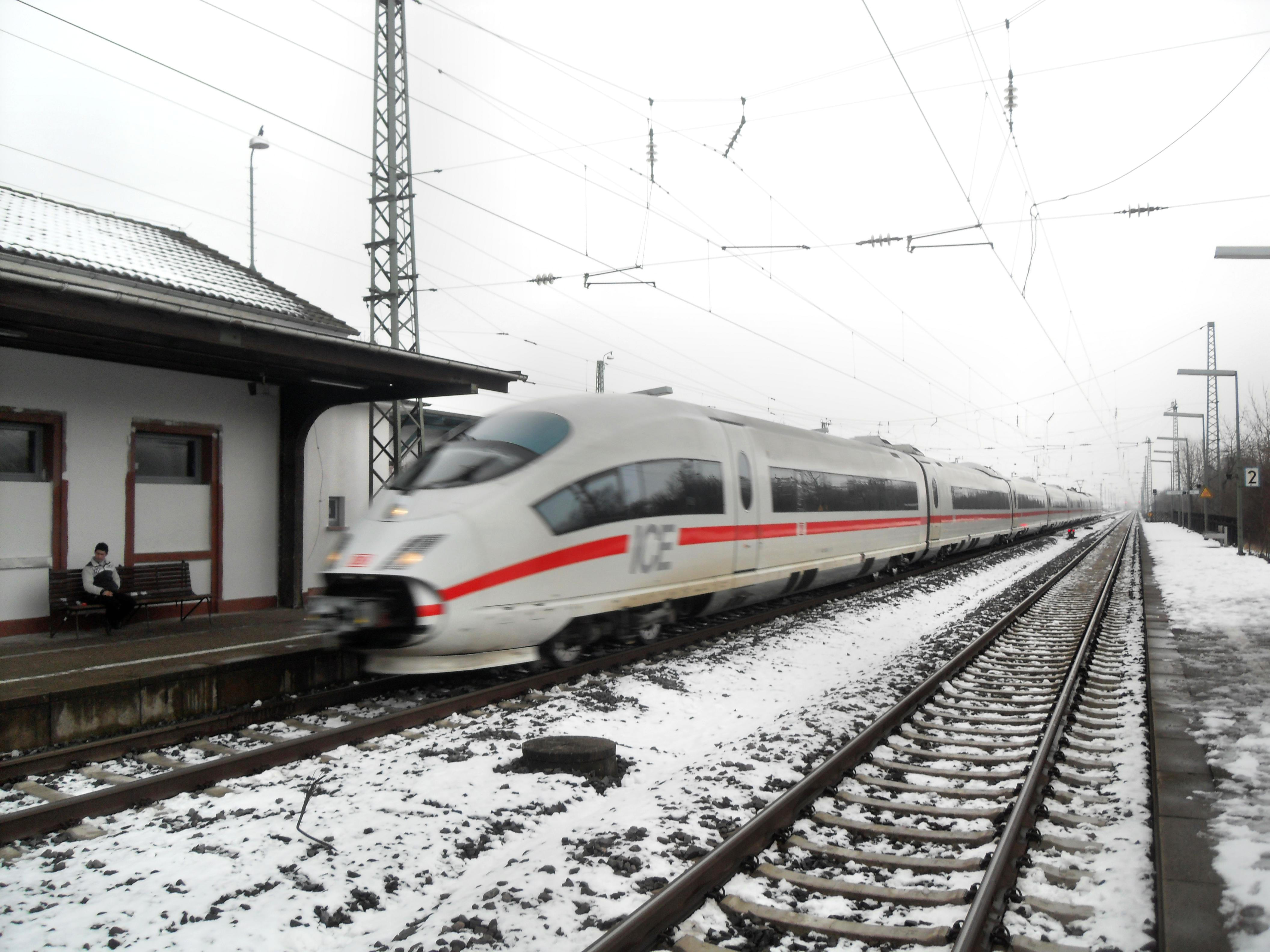 Siemens Velaro im Bahnhof Guntersblum